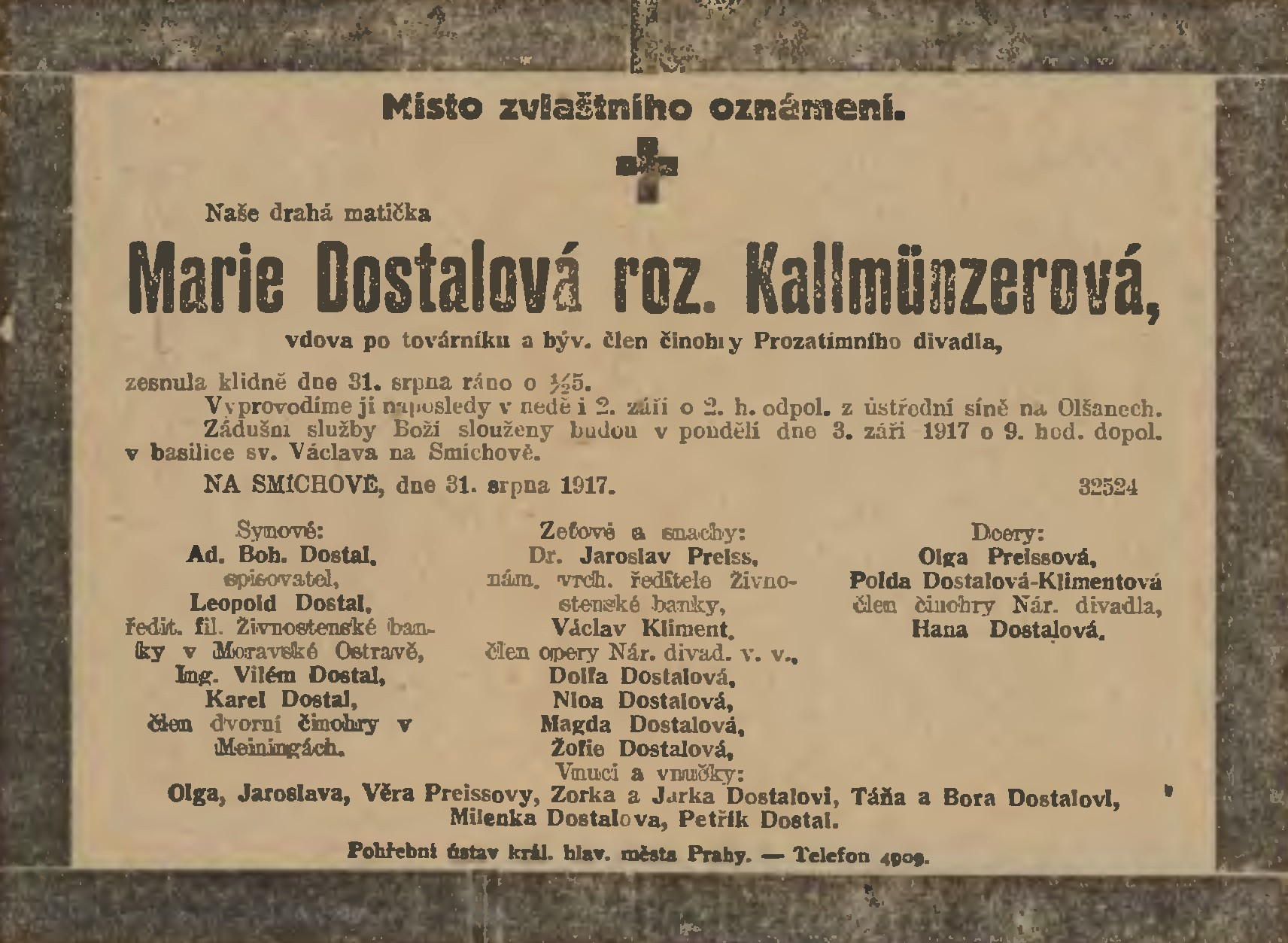 Úmrtní oznámení – Marie Horská- Kallmünzerová , Národní listy 1.9.1917, 2. ranní vydání pro Prahu str.6